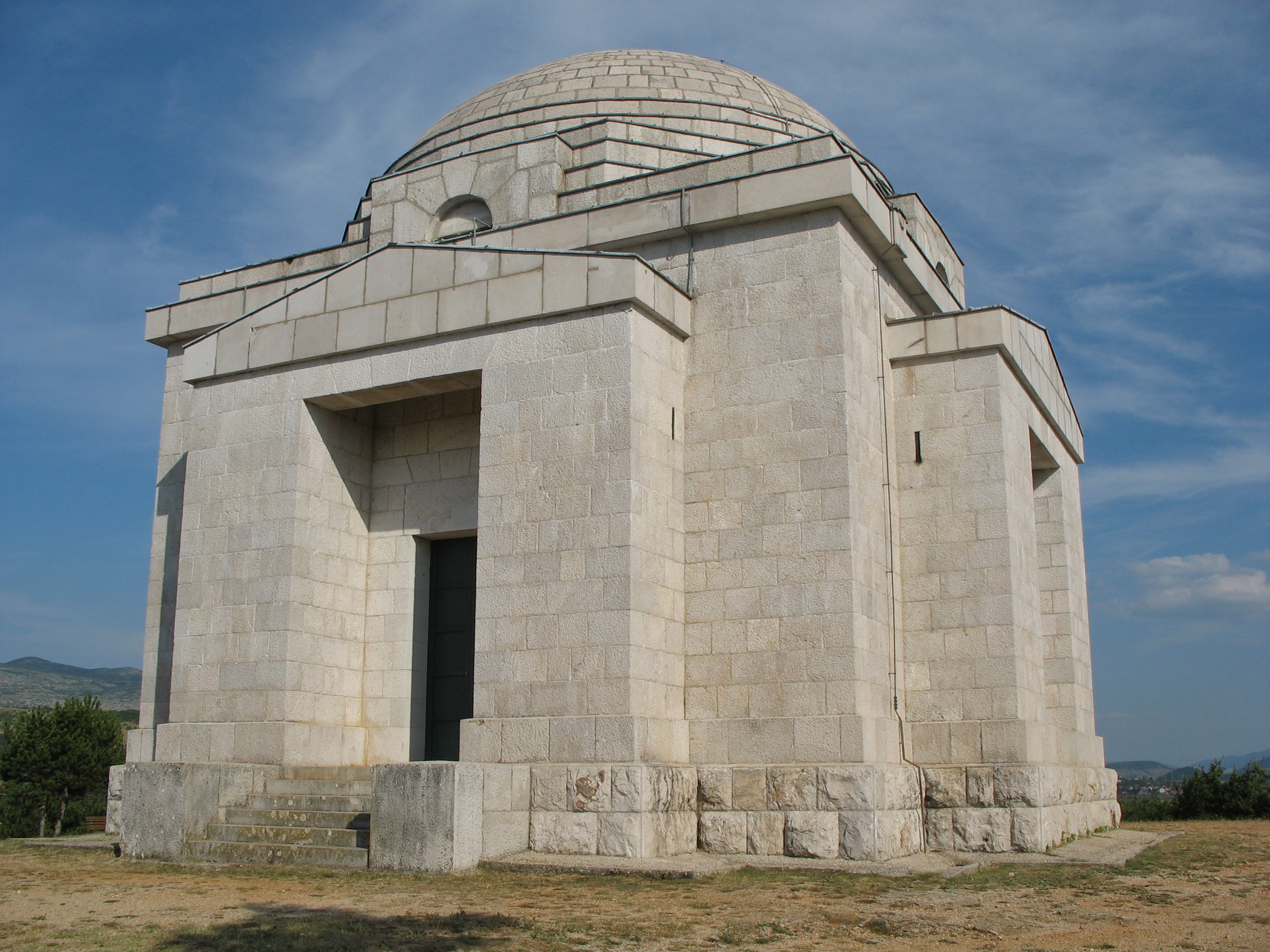 Mauzolej Ivana Meštrovića